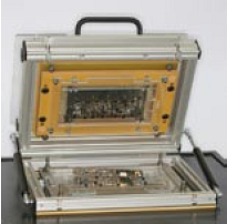 MCA-VA Vakuumadapter